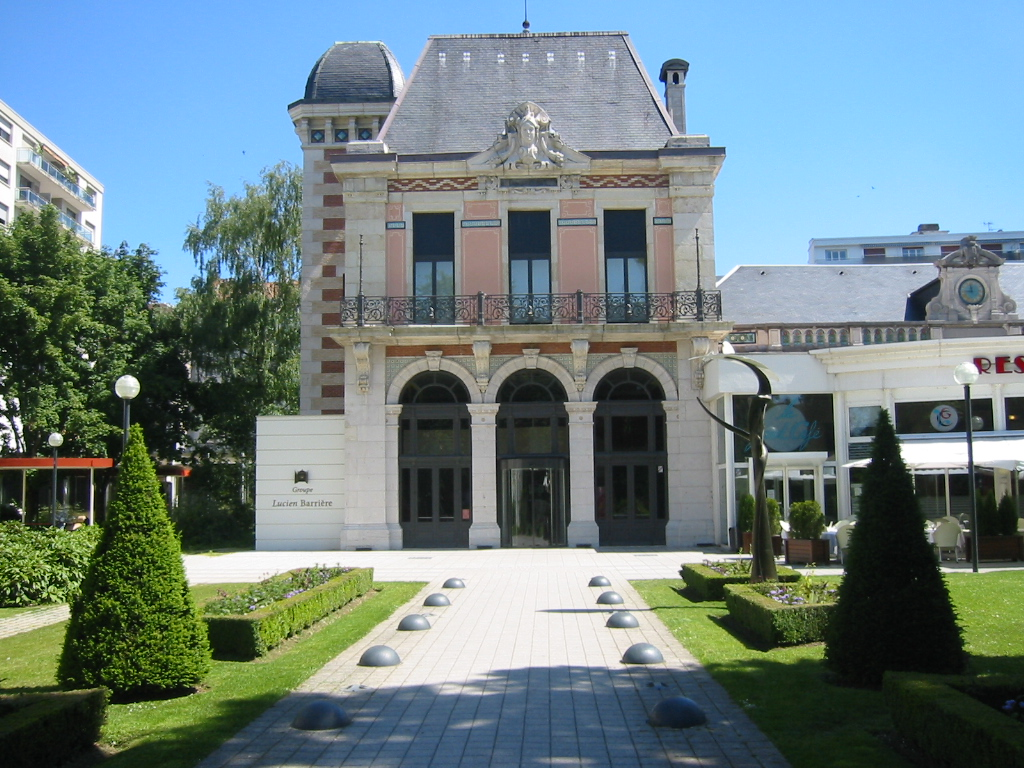 Casino Municipal de Besançon, fut construit en 1890, par l'architecte Marcel Boutterin, lorsque Besançon devient une ville thermale. Avenue Edouard Droz